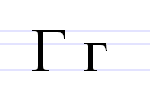 Cyrylicka litera Г.